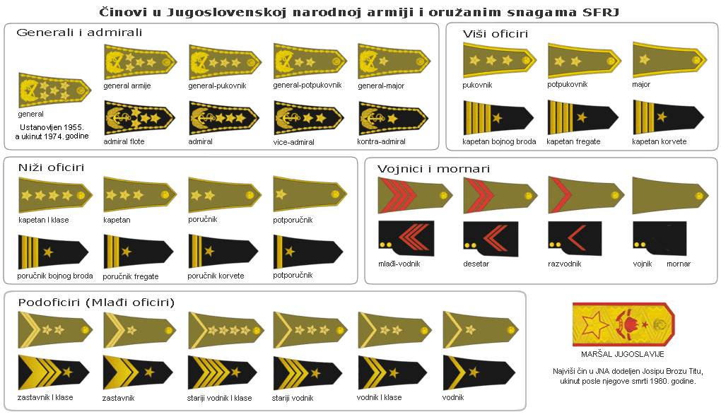 Српски (ћирилица): Чинови